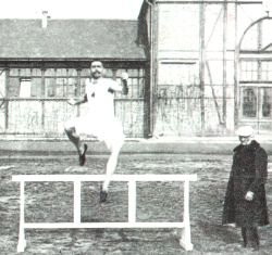 Alajos Szokolyi Taken from